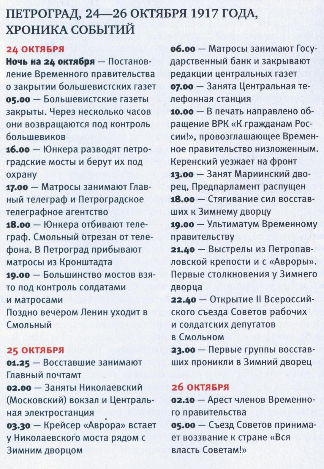 Хроника событий в Петрограде в 24-26 октября 1917 года.